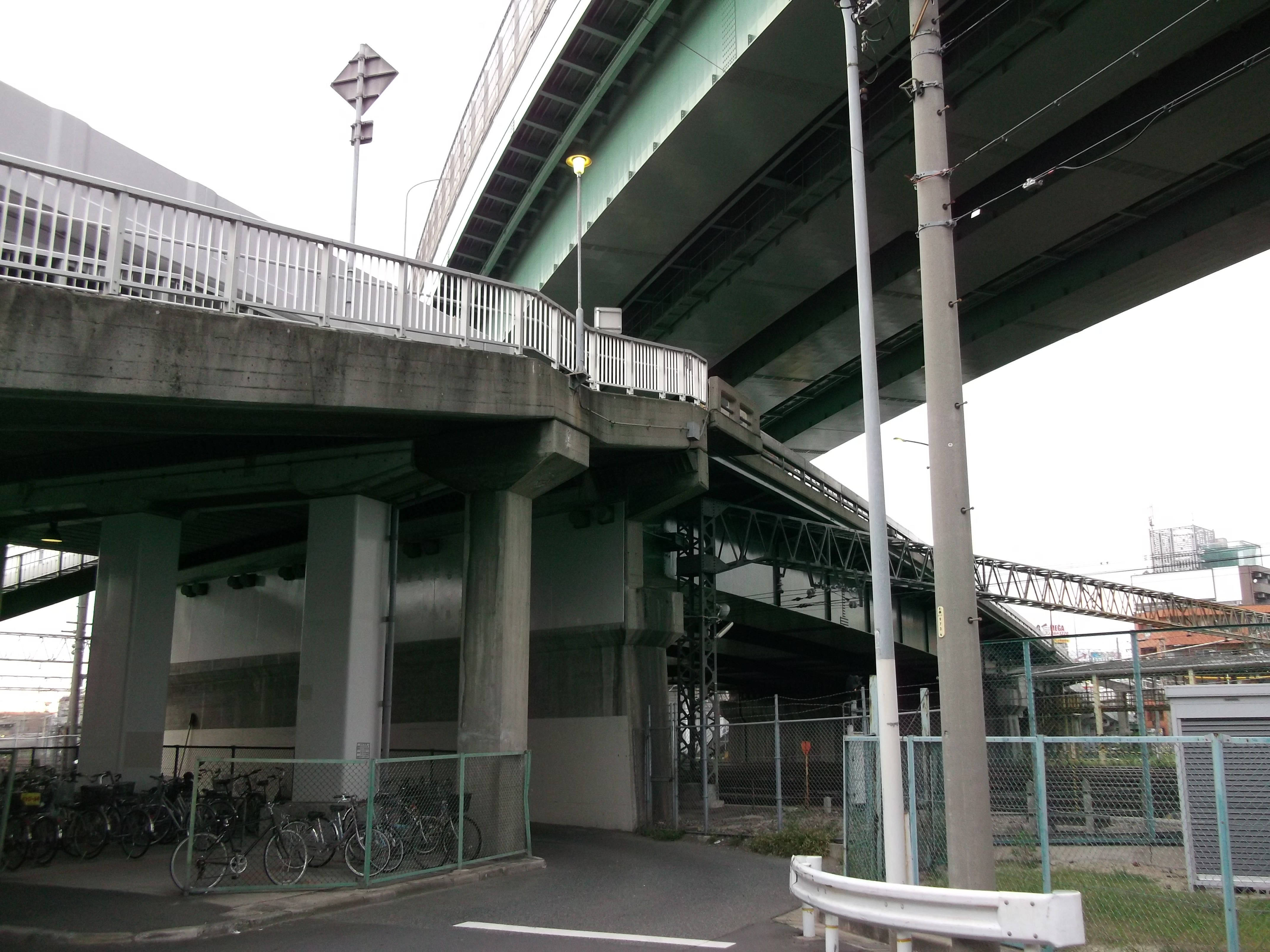 名古屋市中村区・中川区の黄金跨線橋を南東側から撮影。